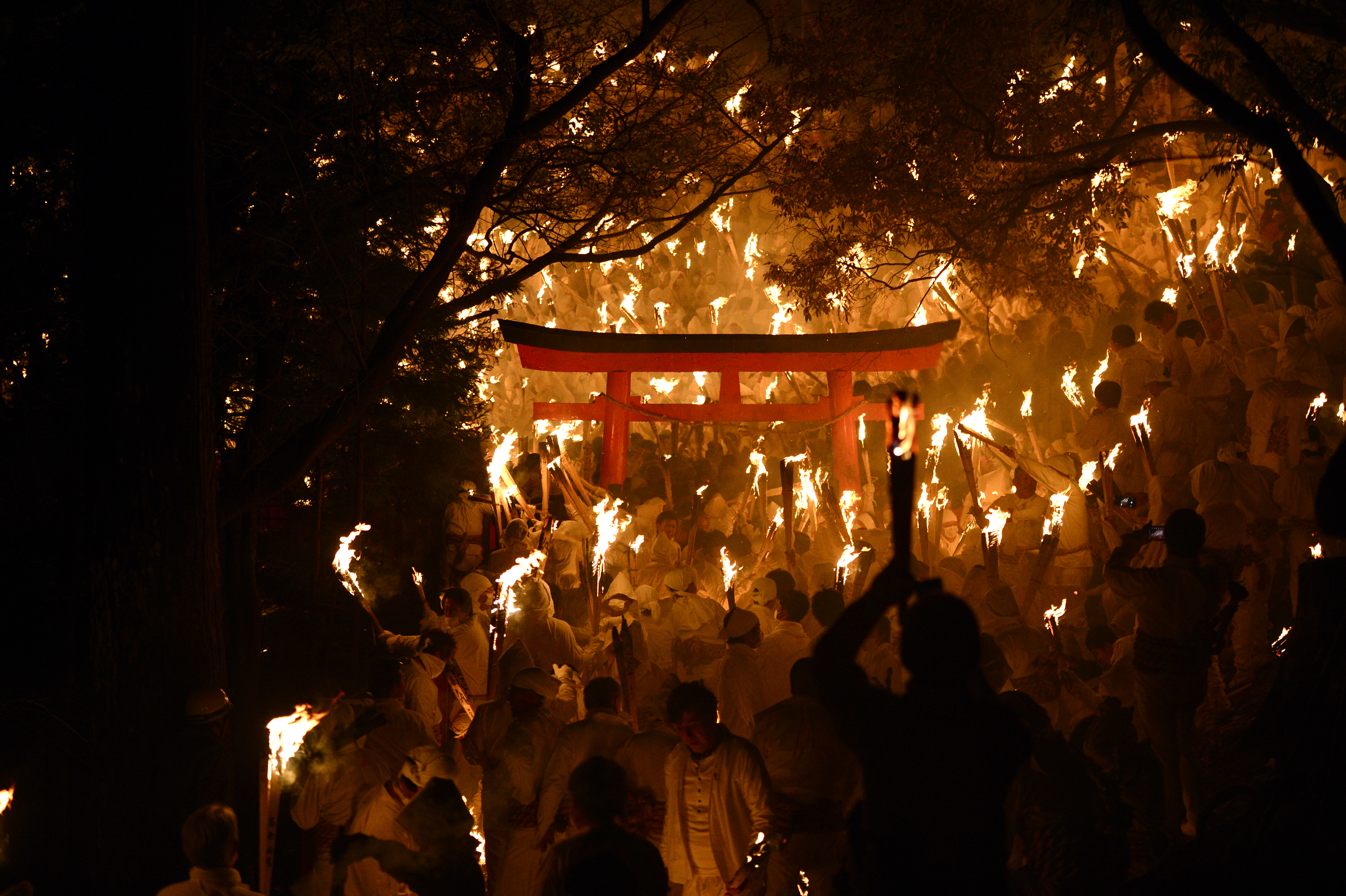 「和歌山県 新宮の御燈祭」FIND/47プロジェクト